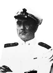 Toschi in divisa